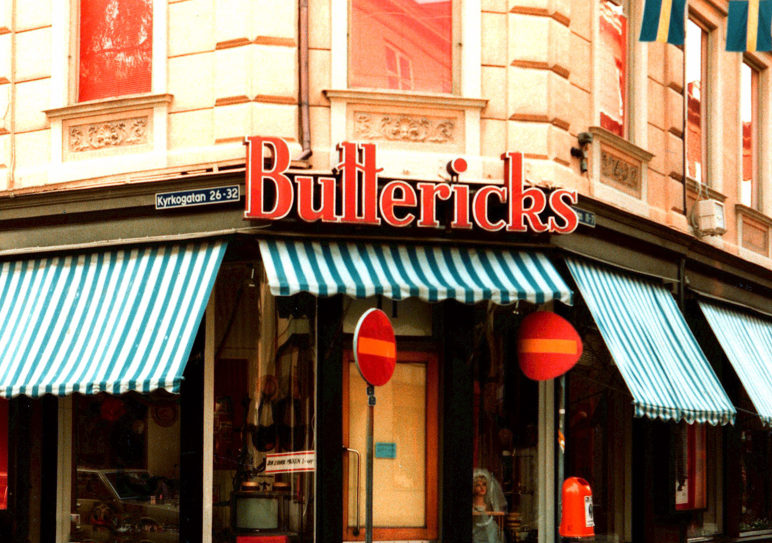 Buttericks, Göteborg (1982)